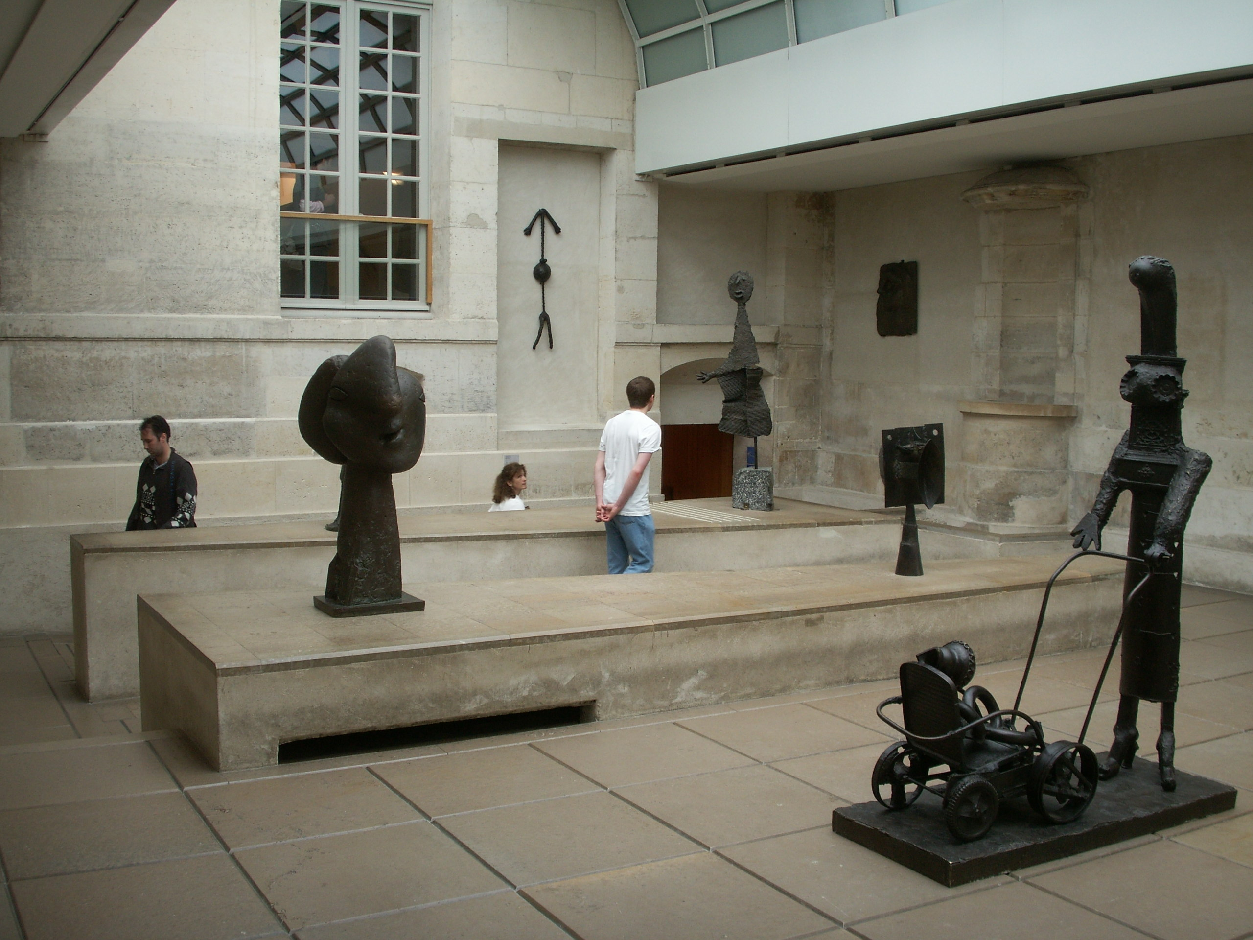 Museo Picasso